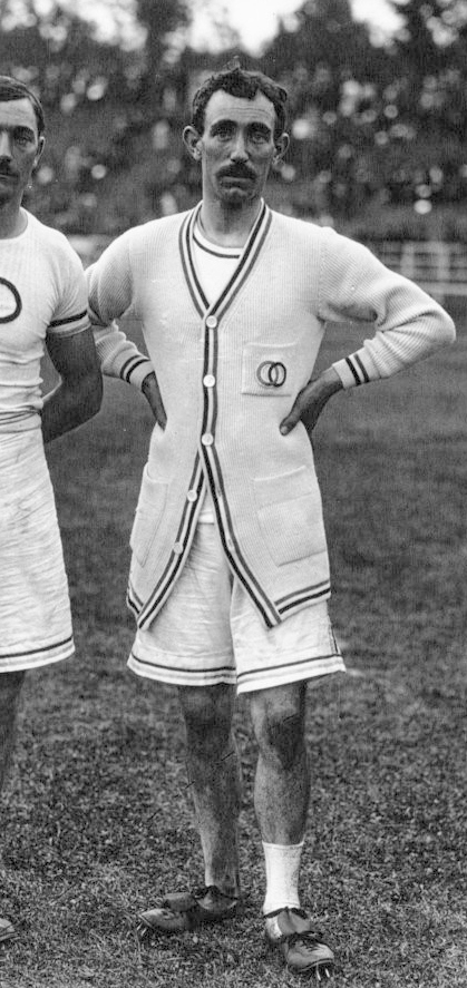 Reims : Parc Pommery, jeux olympiques : groupe : Gonder, Garon, de Guanderax : [photographie de presse] / Agence Meurisse